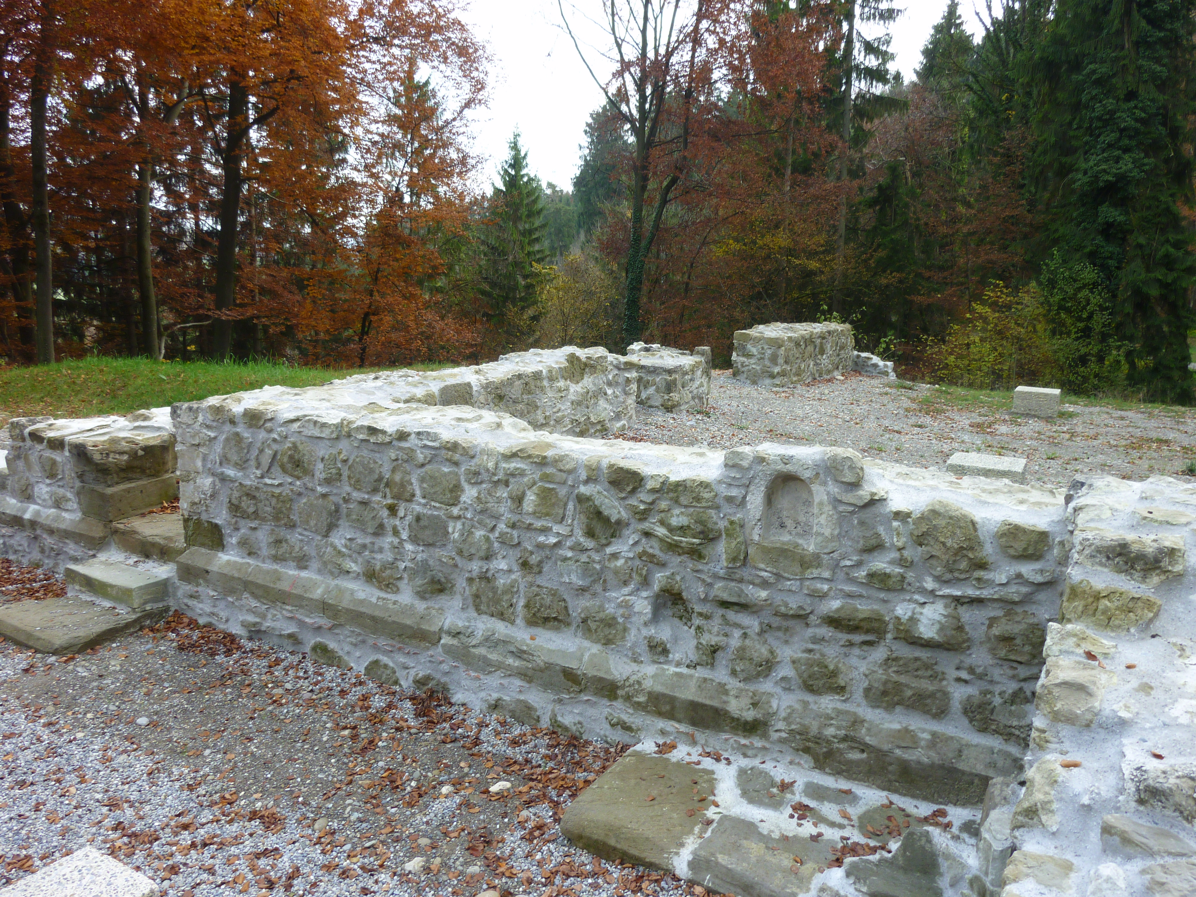 Kloster Beerenberg bei Winterthur-Wülflingen Konventshaus